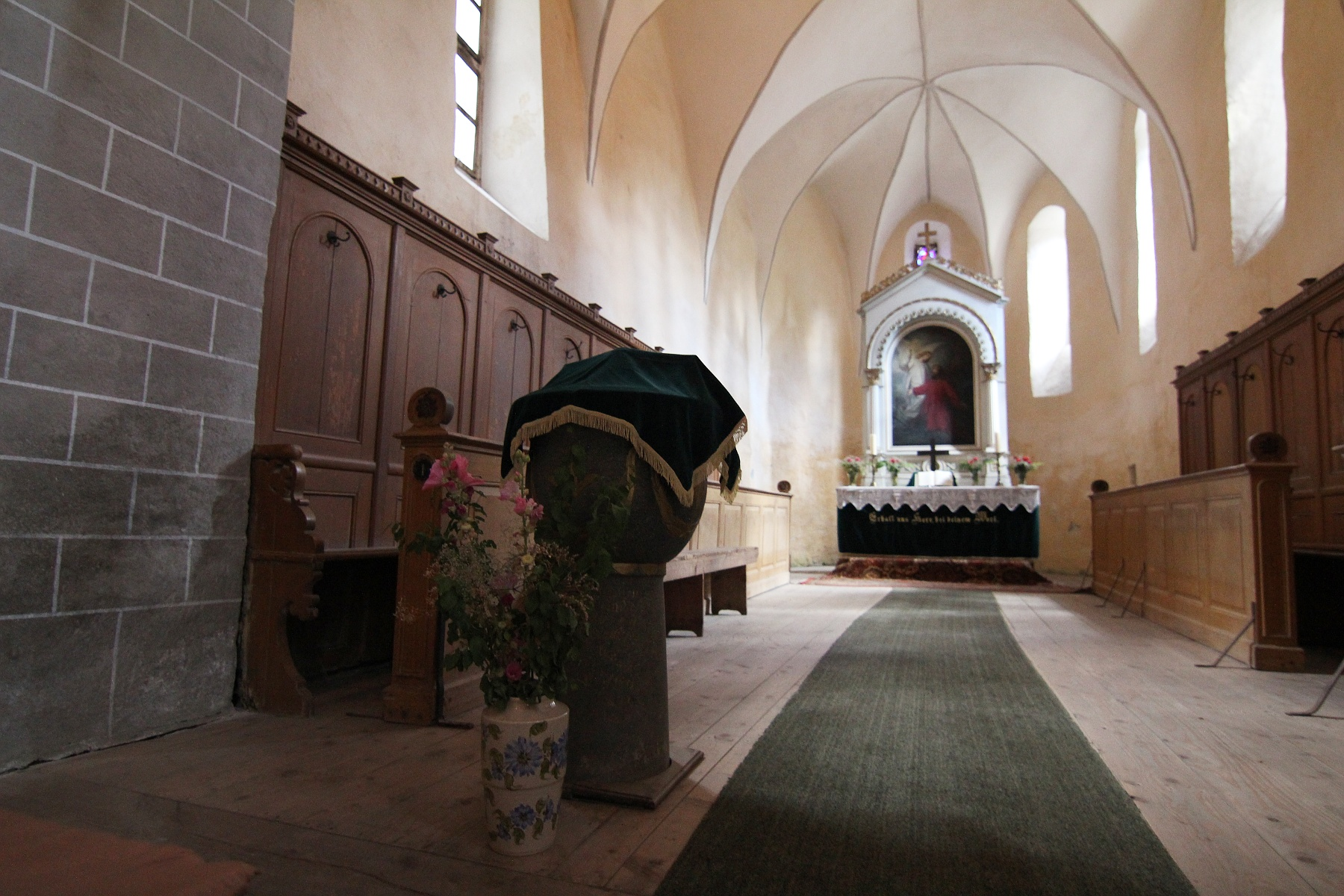 Biserica evanghelică fortificată 01